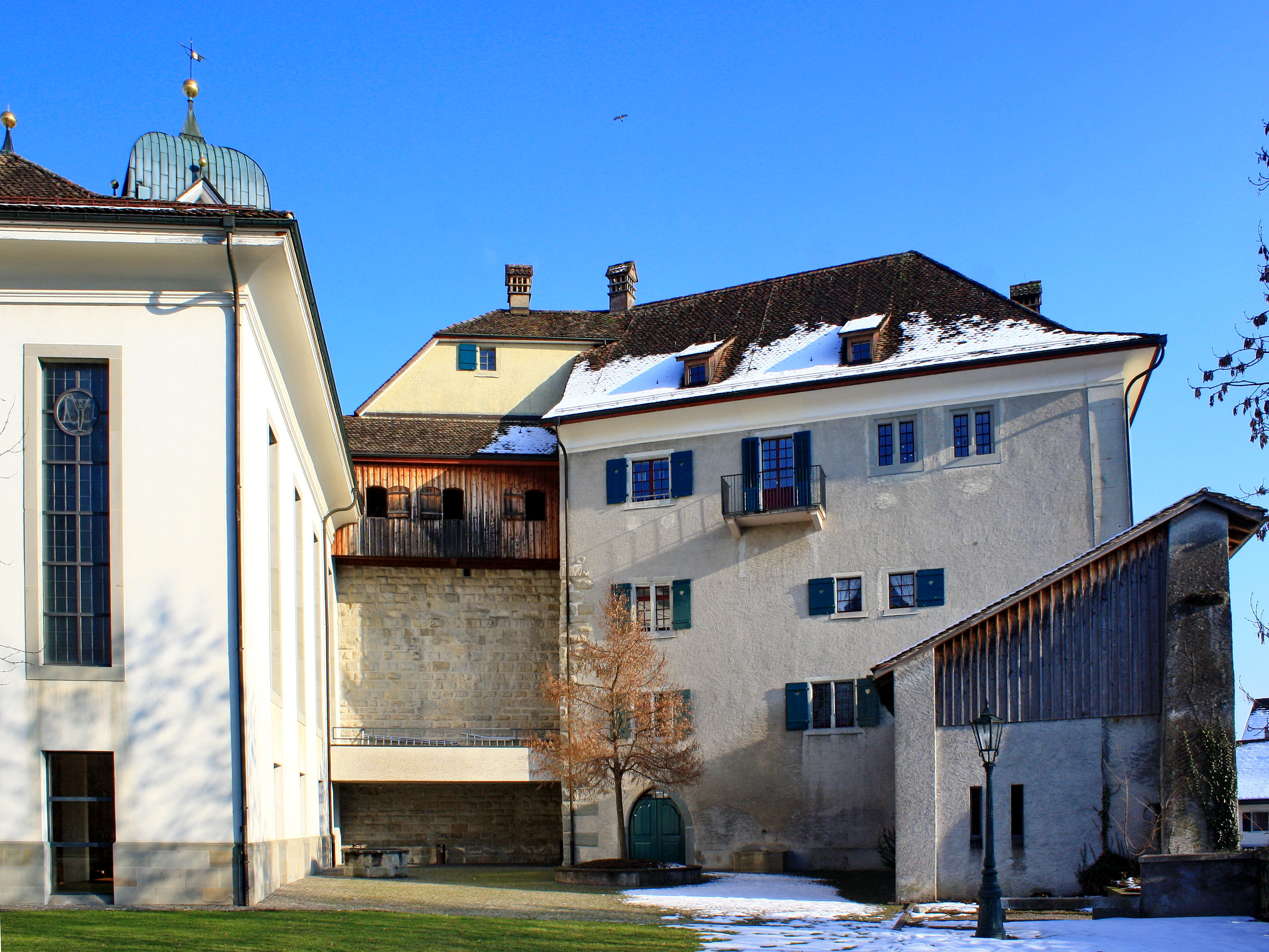 Reformierte Kirche and Schloss in Grüningen (Switzerland)